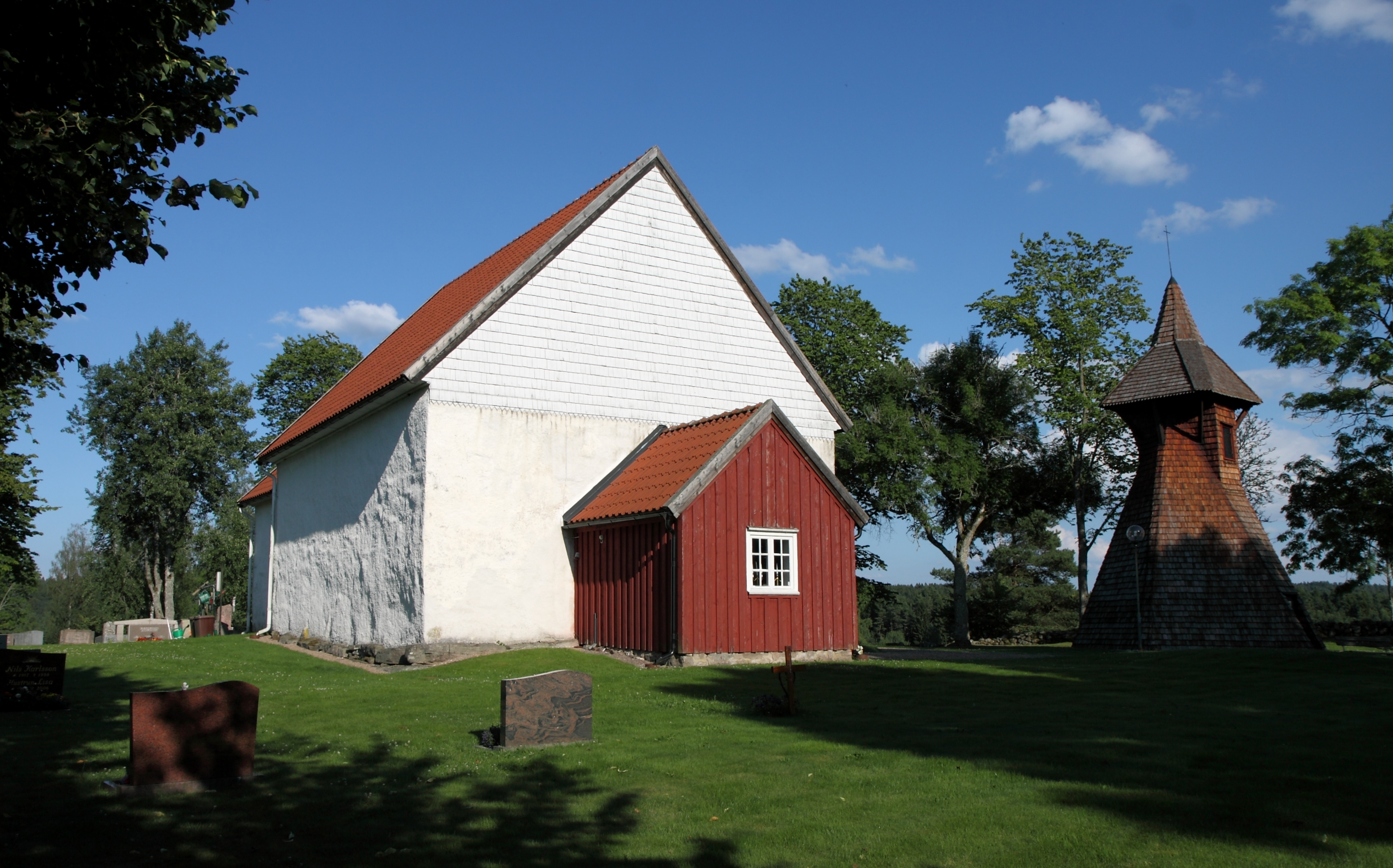 Horla kyrka.